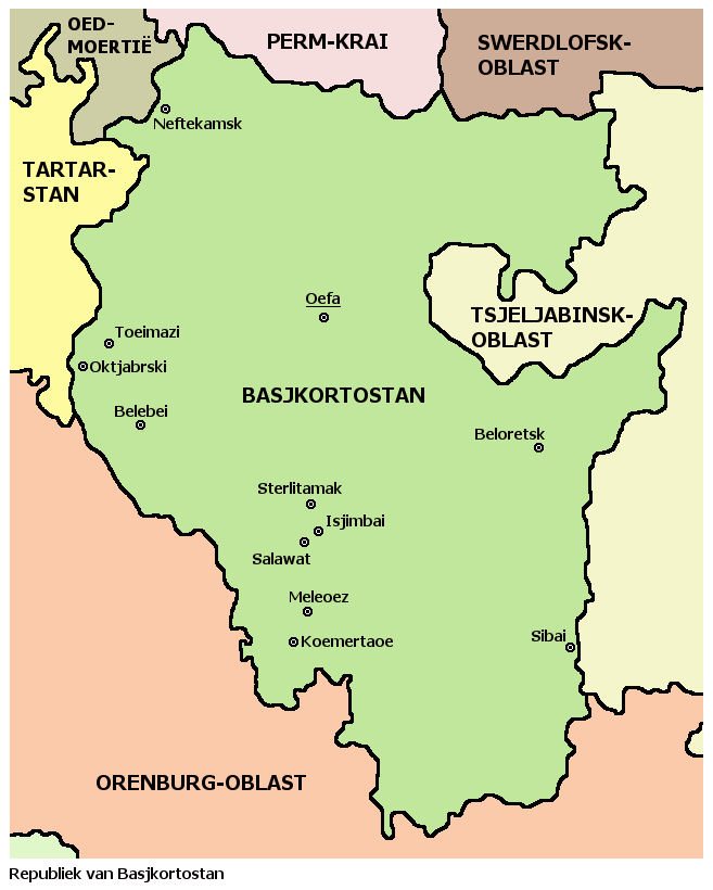 Kaart van Basjkortostan, Rusland